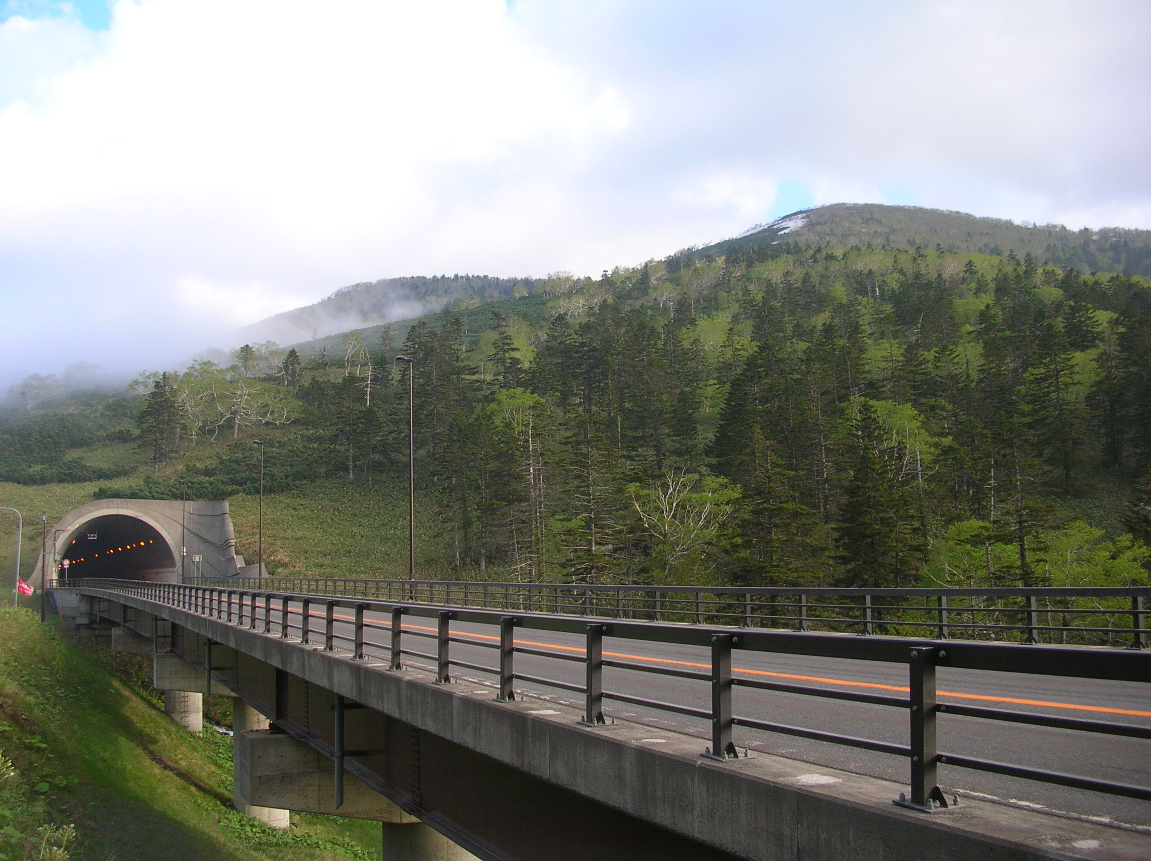 日勝峠の入口（Nissyo Pass）